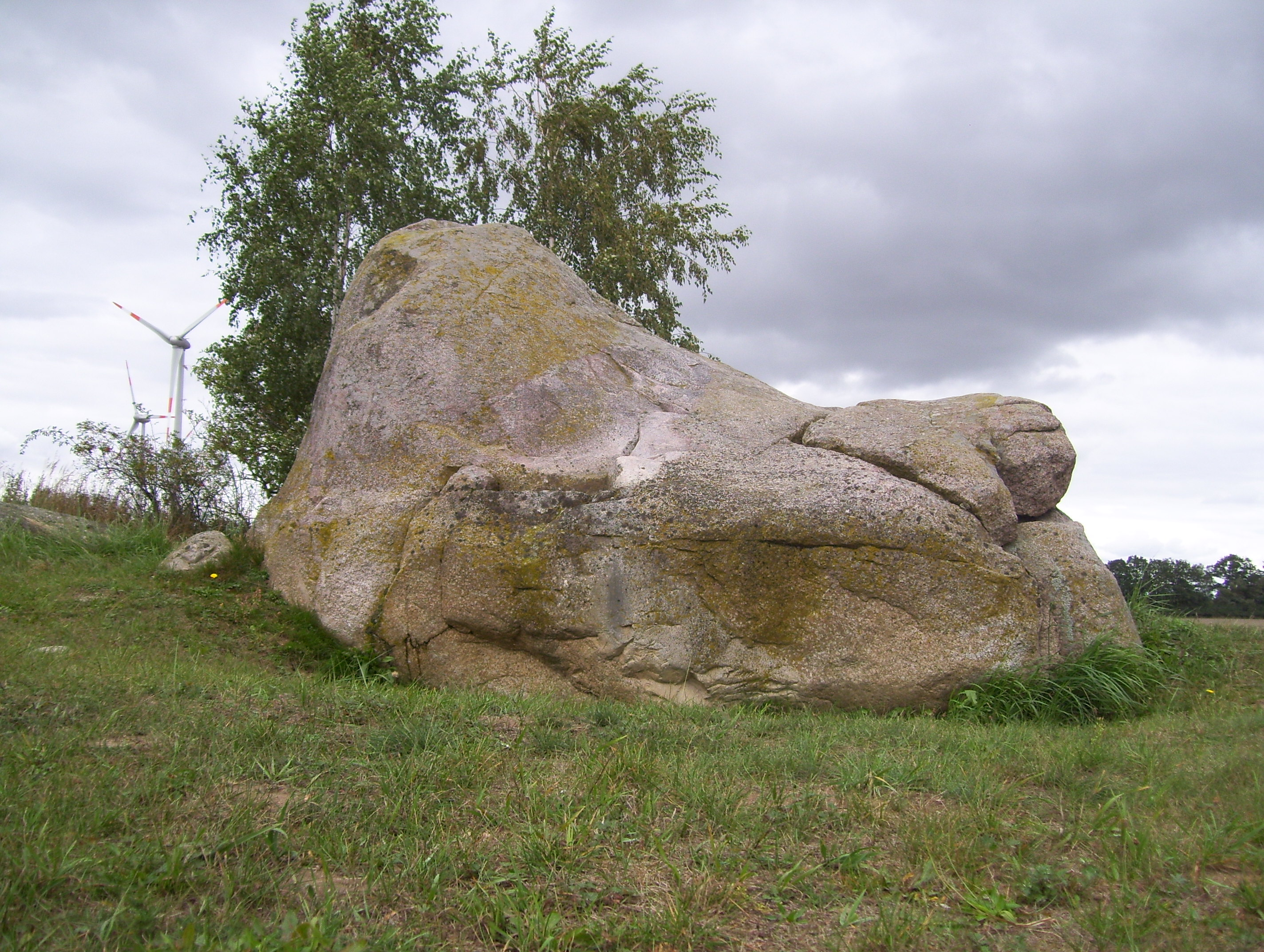 Teufelsstein bei Friedland (Mecklenburg), Westseite